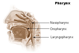 Pharynx